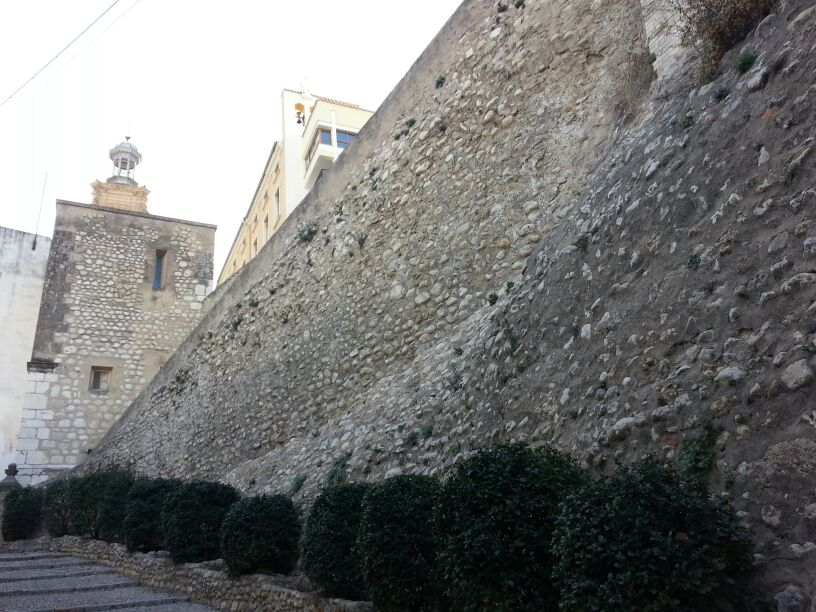 Muralla vista 2